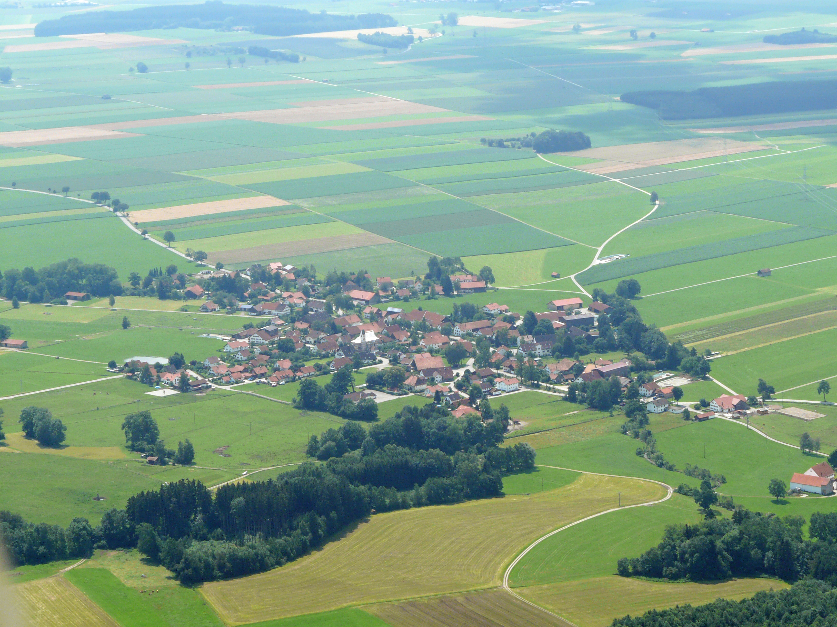 Waalhaupten von oben